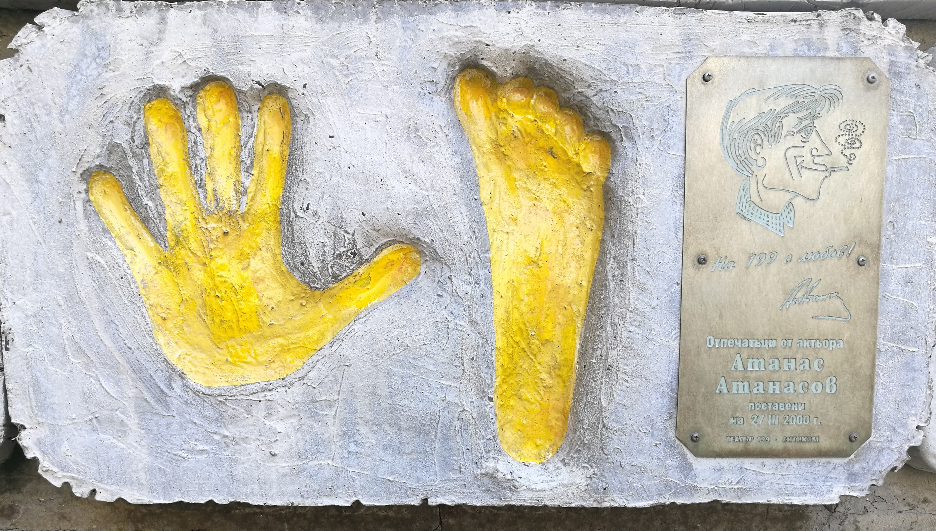 Стената на славата пред Театър 199 - пано с отпечатъци, послание и шарж на Атанас Атанасов.